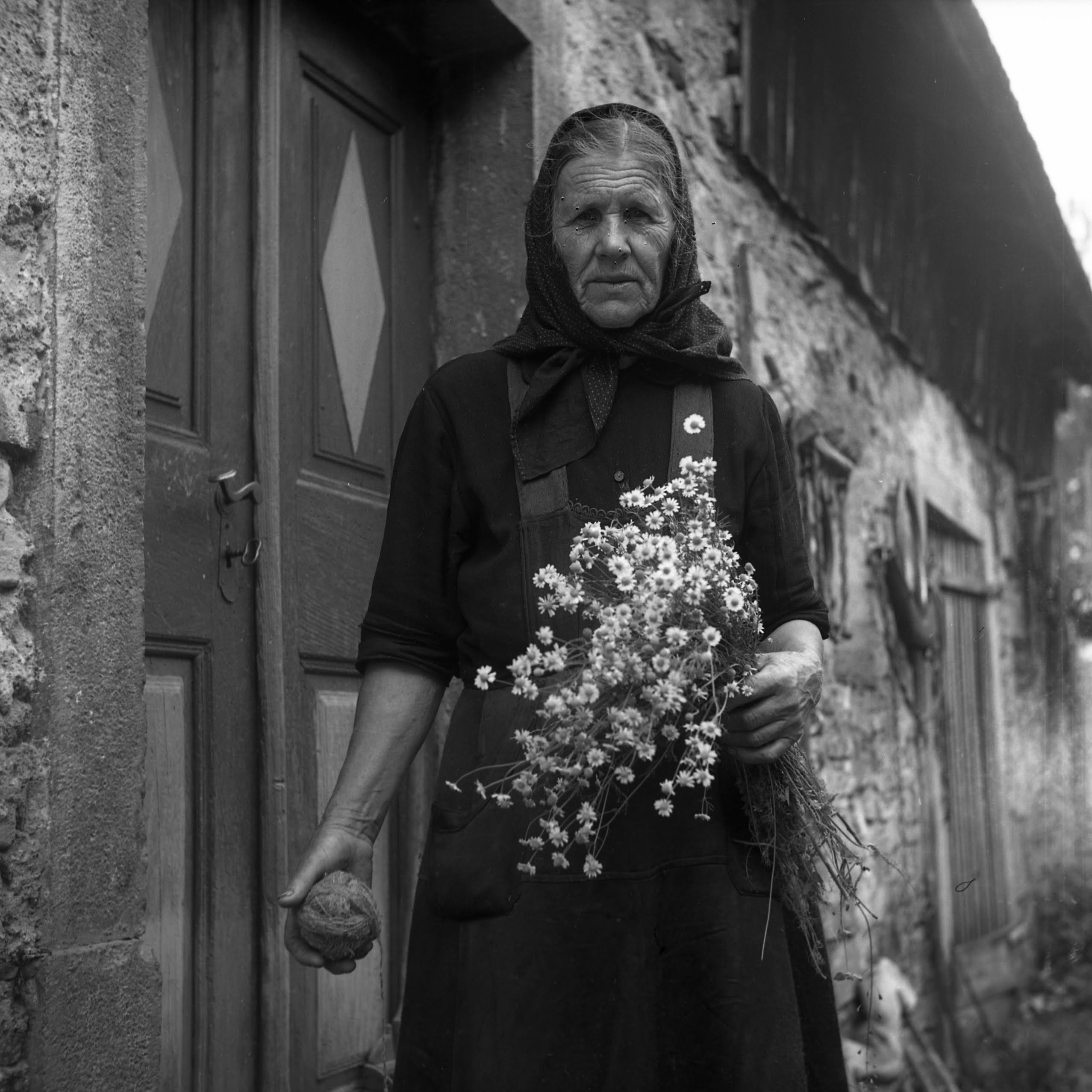 Žena je pravkar nabrala kamilice za zdravila, Podlož.